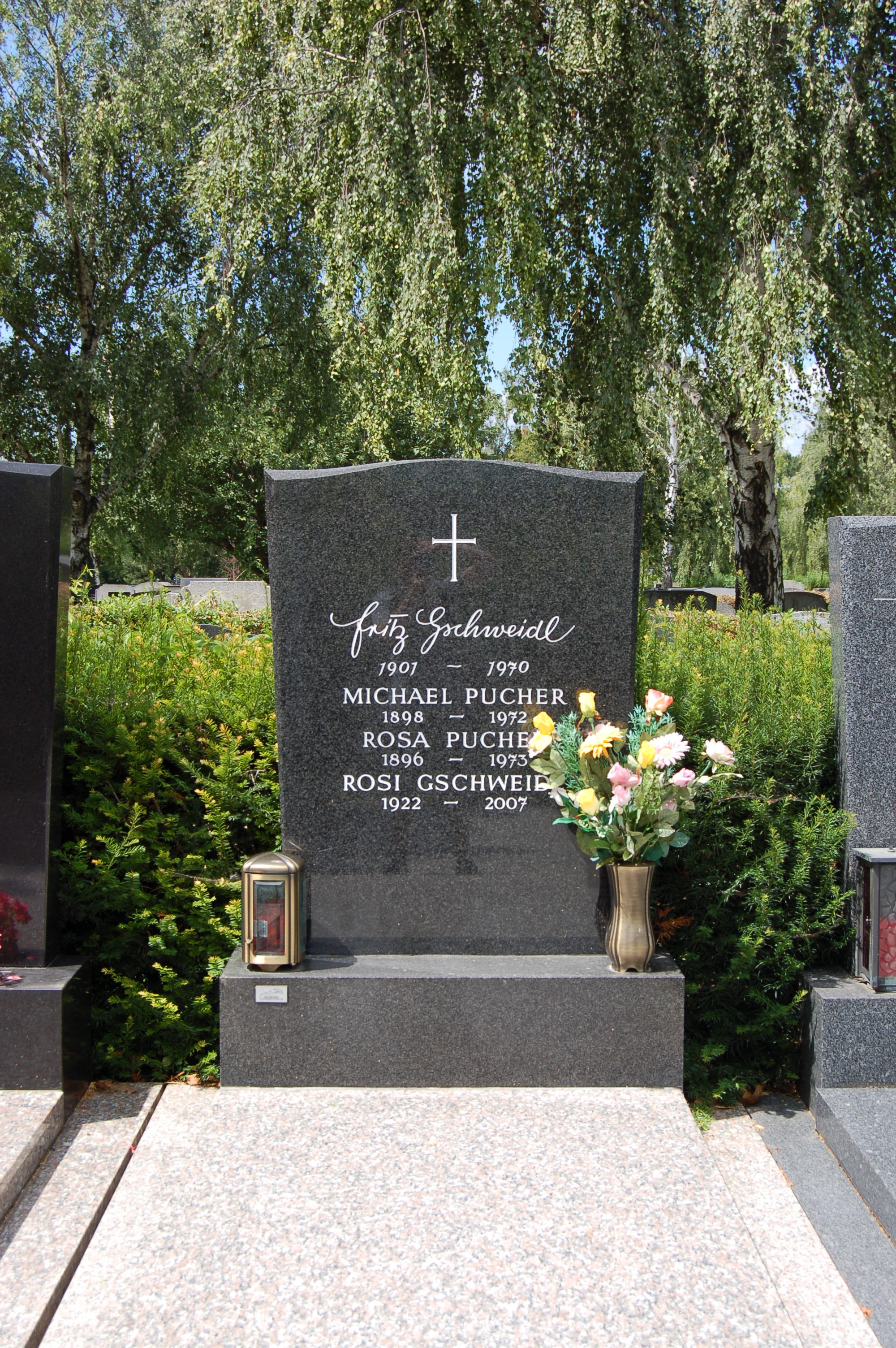 Stammersdorfer Zentralfriedhof, Grabmal von Friedrich Gschweidl, Fußballspieler